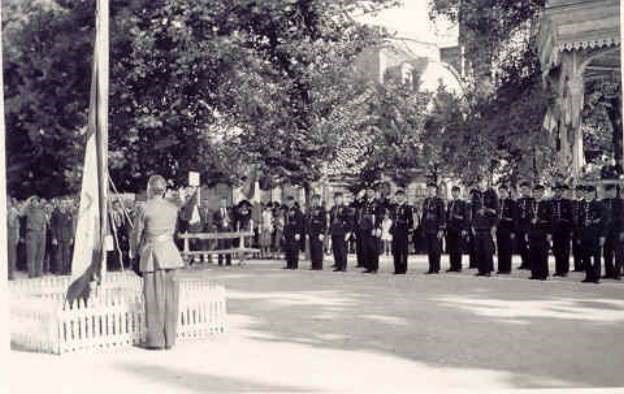 Remise du drapeau tricolore à croix de Lorraine siglé "Police de Châtellerault" au Commissaire Bichat en l'honneur des actions de Résistance des policiers châtelleraudais pendant la guerre en présence du Commissaire régional de la République Schuhler et du Sous-Préfet Wiltzer le 14 juillet 1945